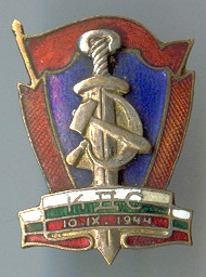 Почетен знак на КДС (1963-1965)